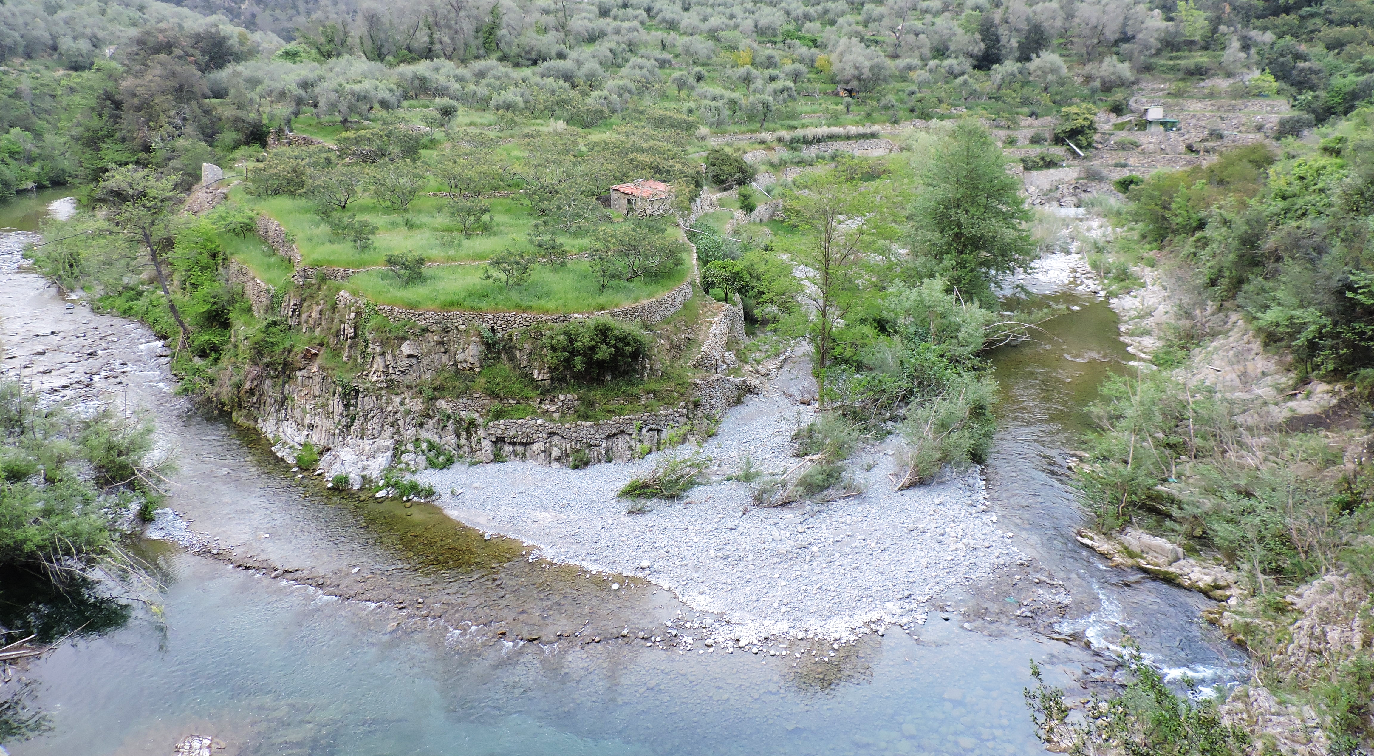 Monte Grammondo - Torrente Bevera (Q47502132) Bevera creek meandre